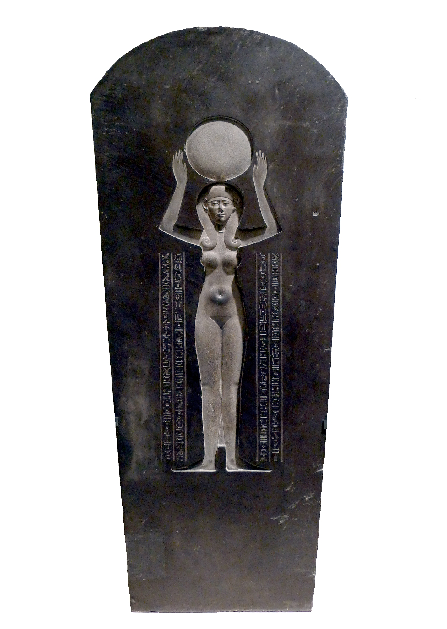 Sarcophage de Djedhor (couvercle) - A l'intérieur du couvercle, la déesse du ciel Nout accueille le mort parmi les étoiles.